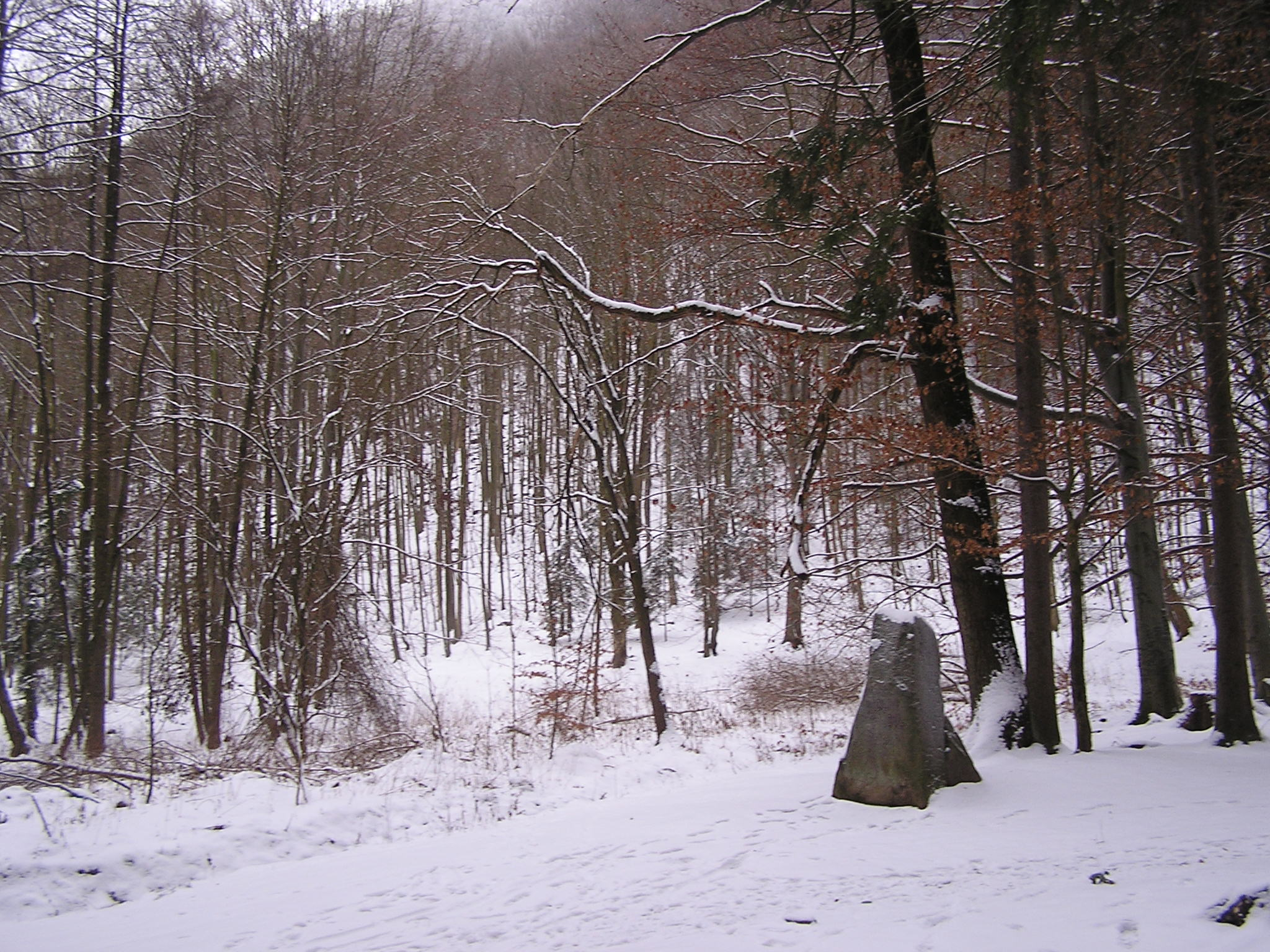 Modlivý důl u Potštejna